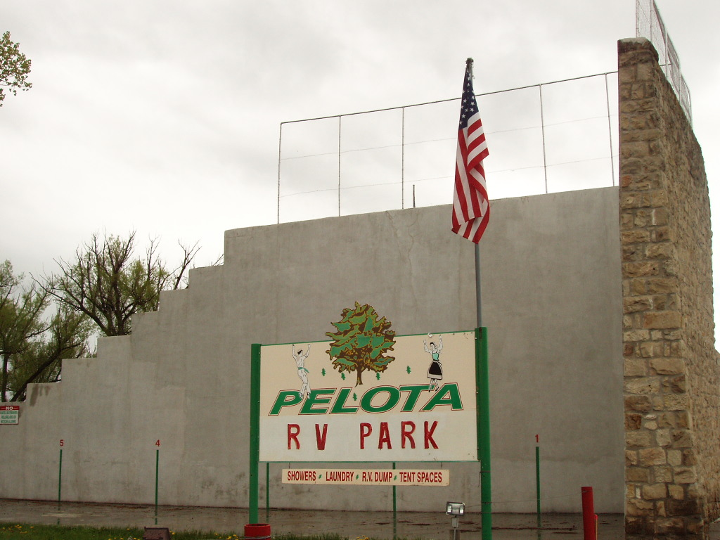 En un pueblecito de Oregon nos topamos con una sorpresa: un frontón en desuso que la utilidad americana ha decidido usar como aparcamiento para caravanas. Se conserva el nombre del deporte para el cual fue creado, y se planta luego la banderita. No hay duda, ser vascoamericano es algo muy peculiar. Adaptemos las tradiciones a las necesidades de la carretera. Real American!